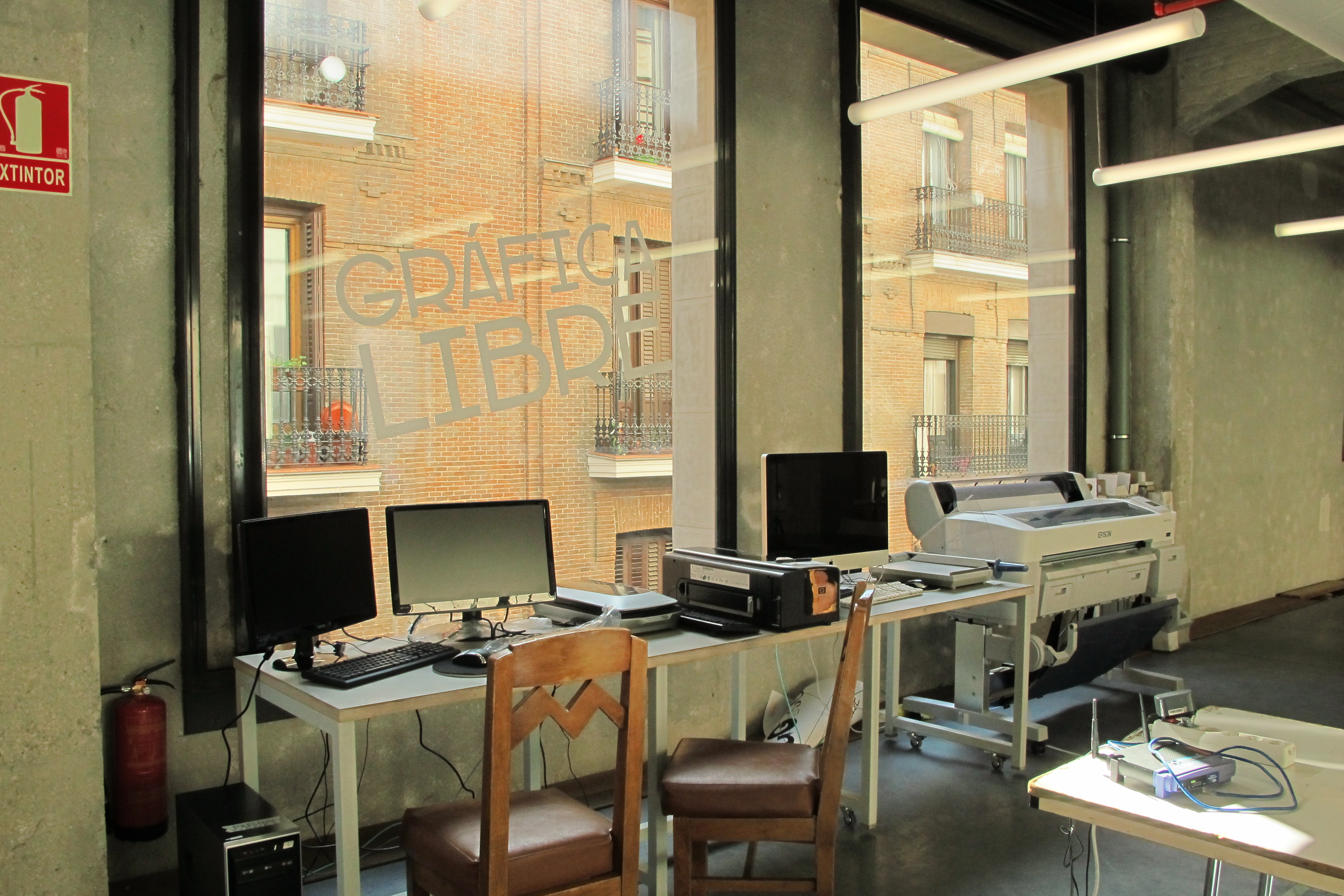 Sala de Medialab PRado, Madrid, España.